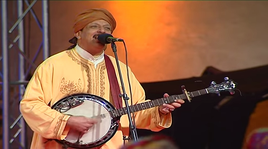 صورة عبد الله أودادن من المغرب